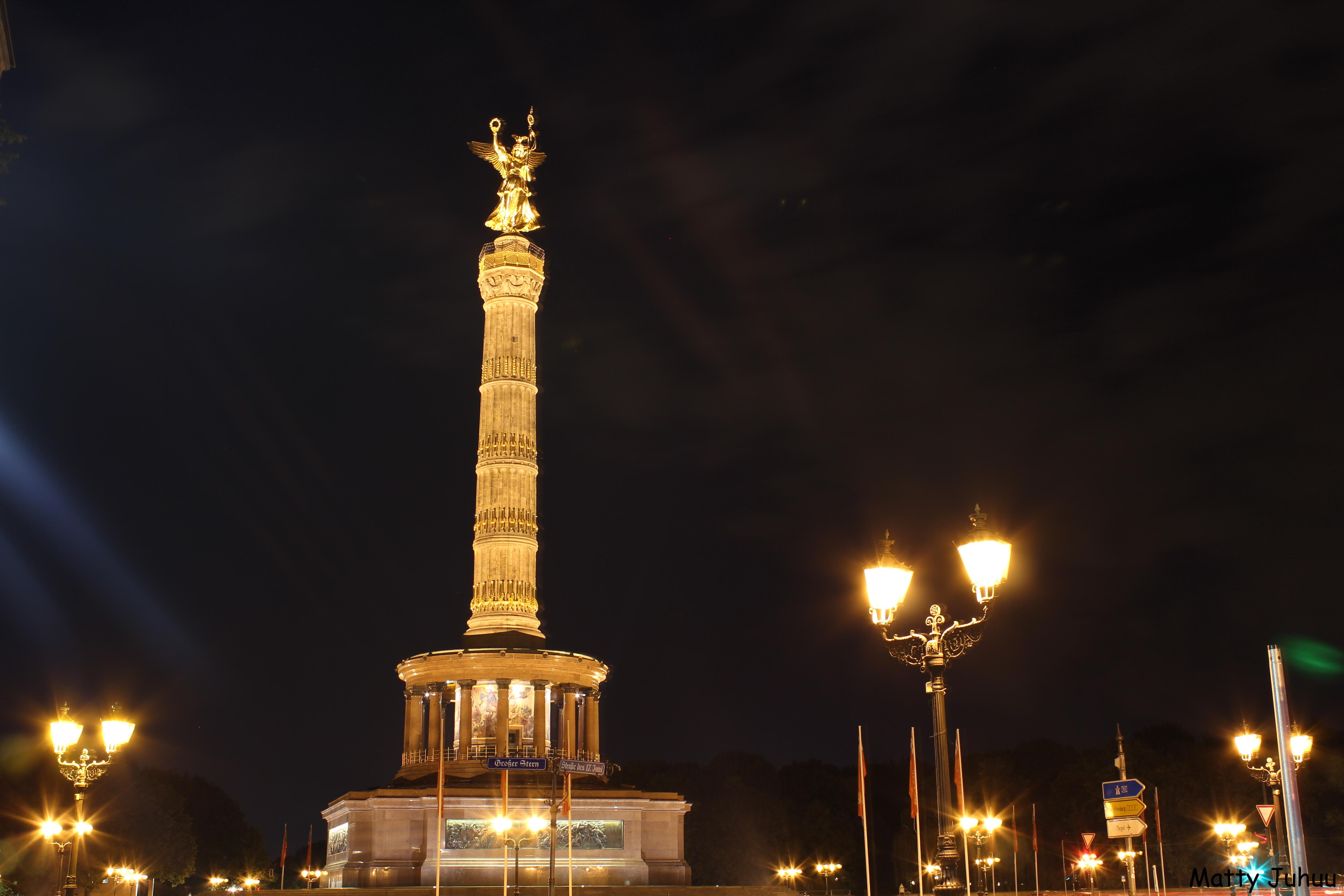 Großer Stern bei Nacht